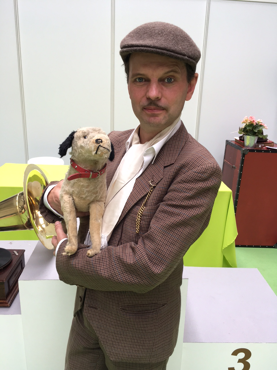 ...auf der House of Dogs 2016